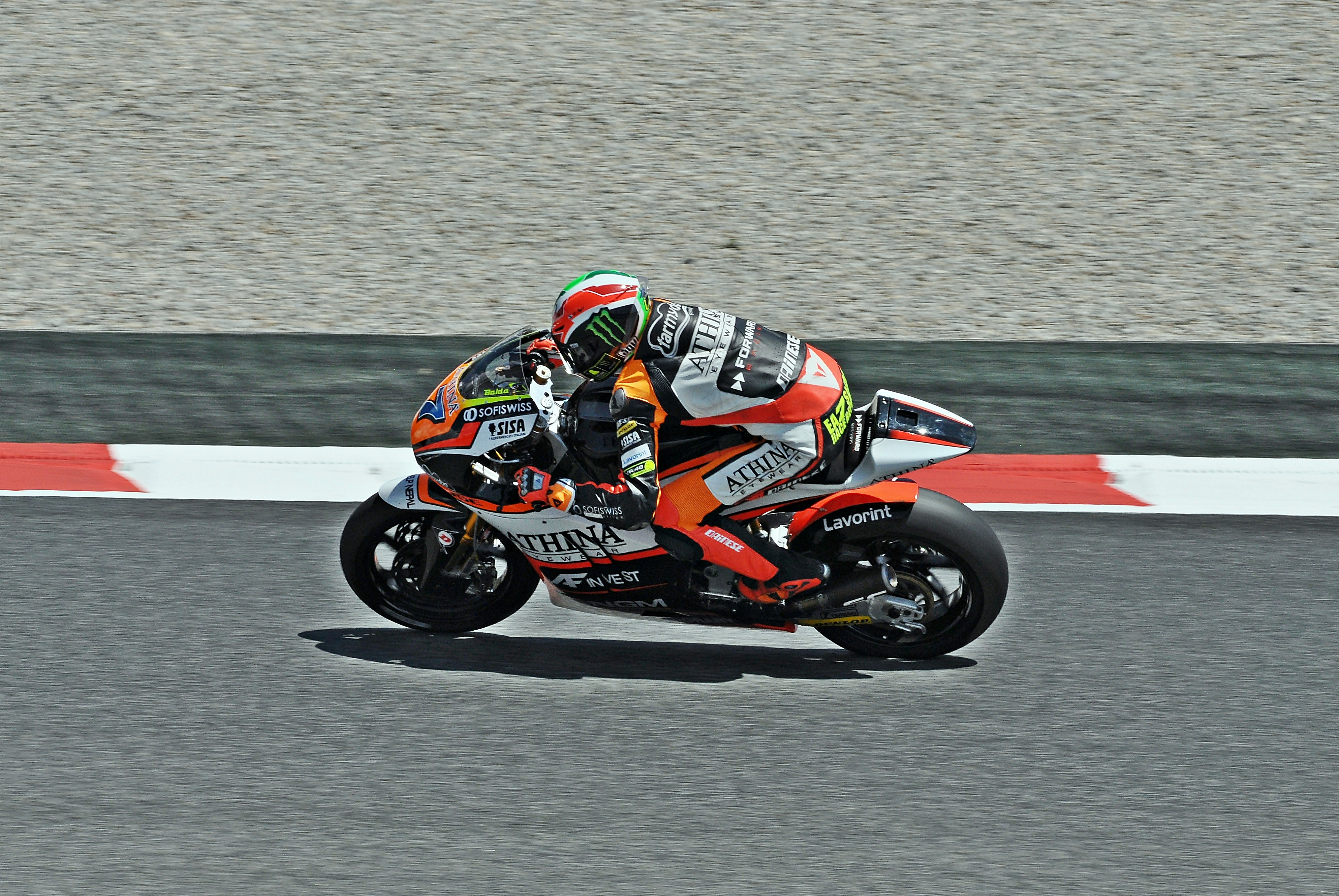 gran premio de cataluña